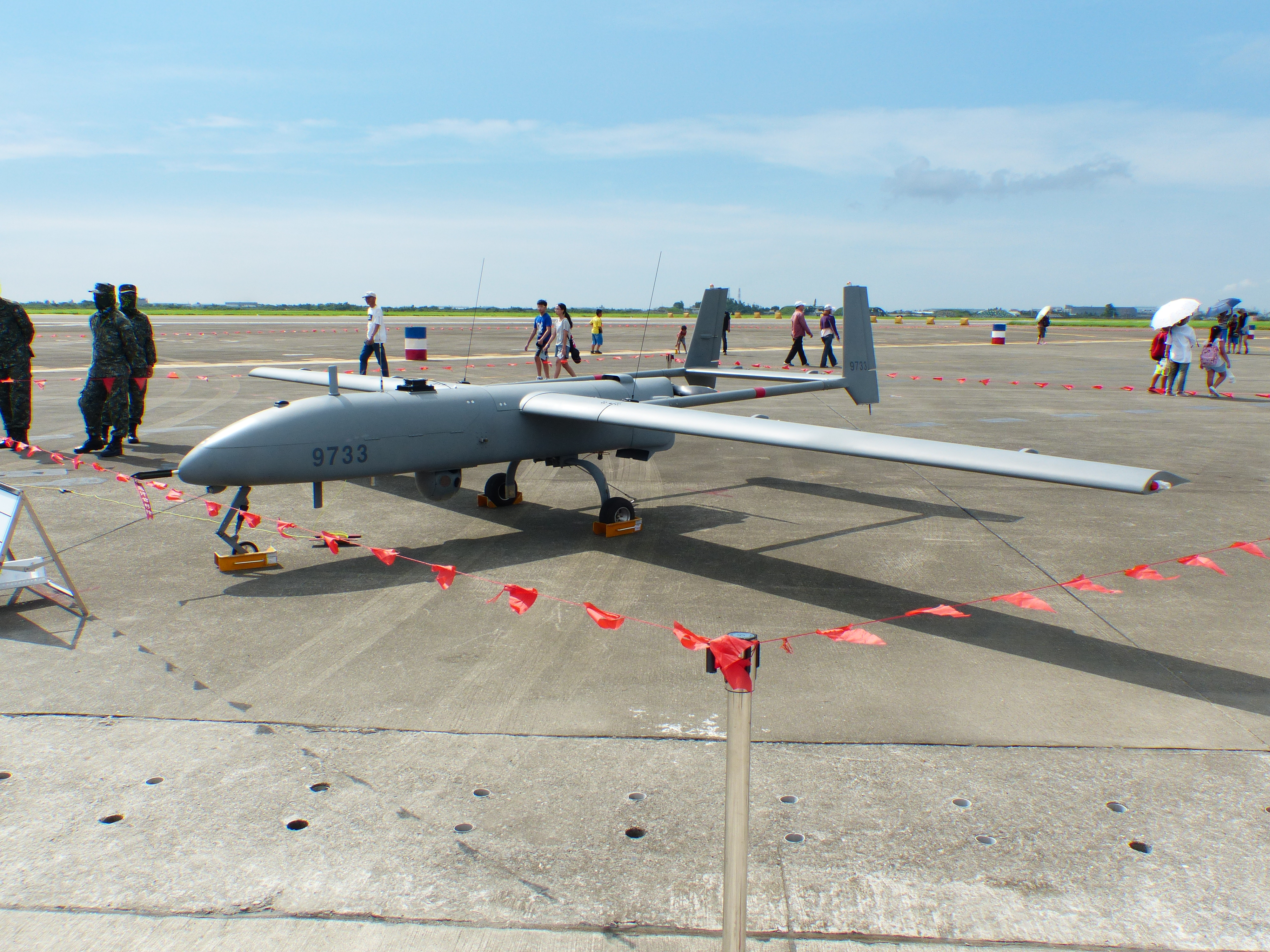 中文（台灣）: 2017年空軍官校營區開放活動下午，停機坪靜態展示的中科院銳鳶無人機。